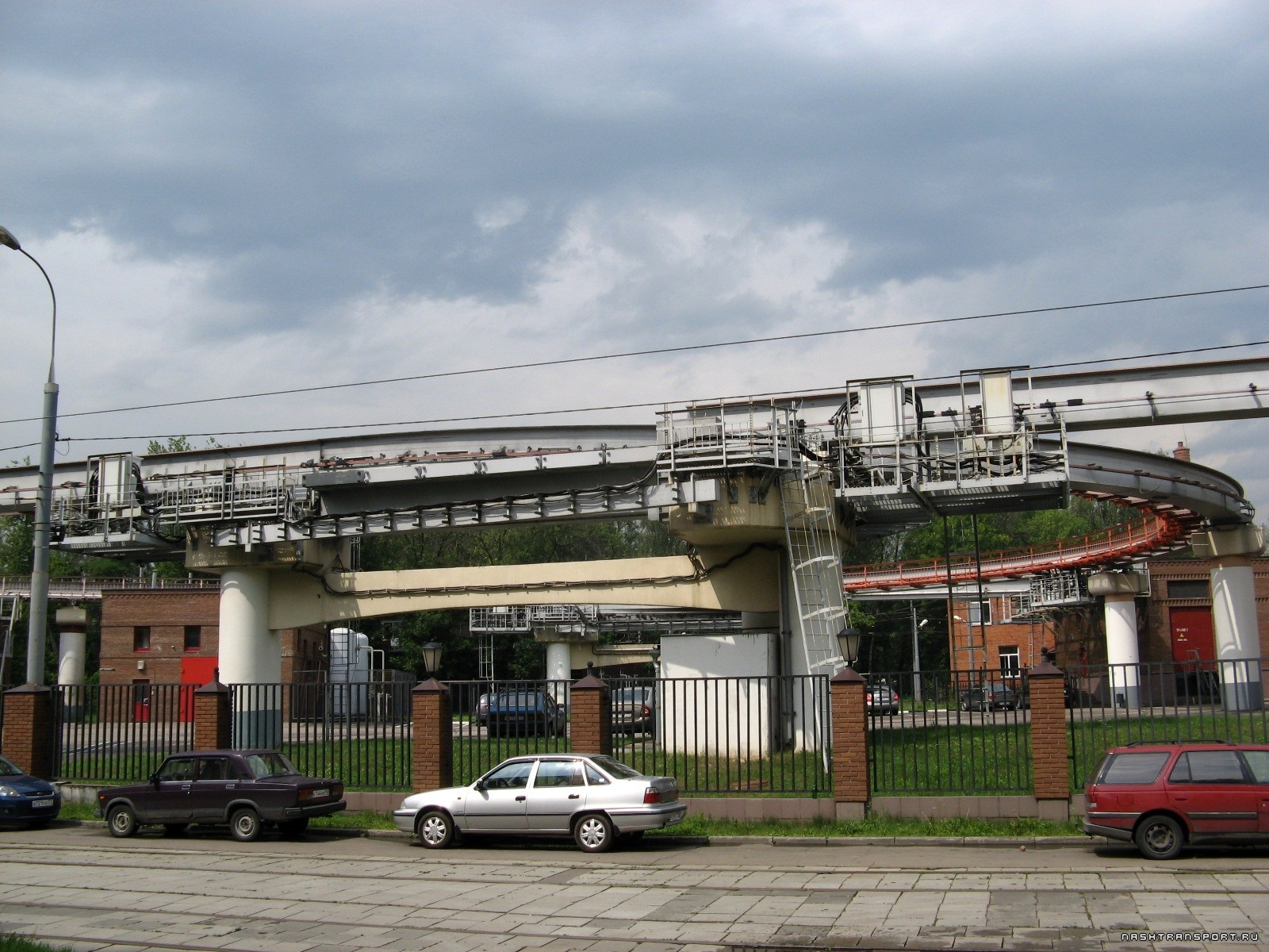 Стрелка и разворотный круг в электродепо Ростокино Московского монорельса.